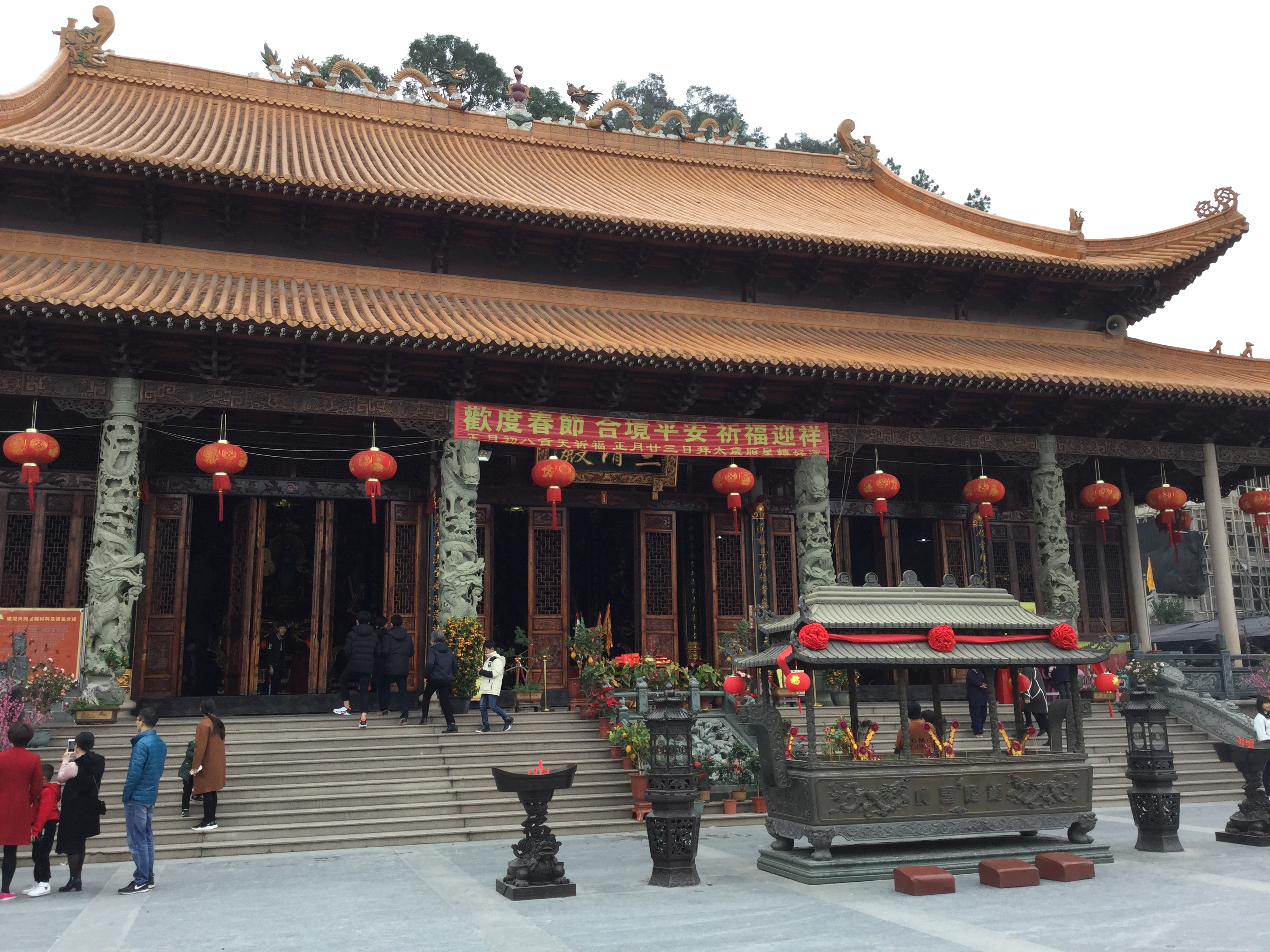 中文（中国大陆）: 揭阳道教华阳观三清殿